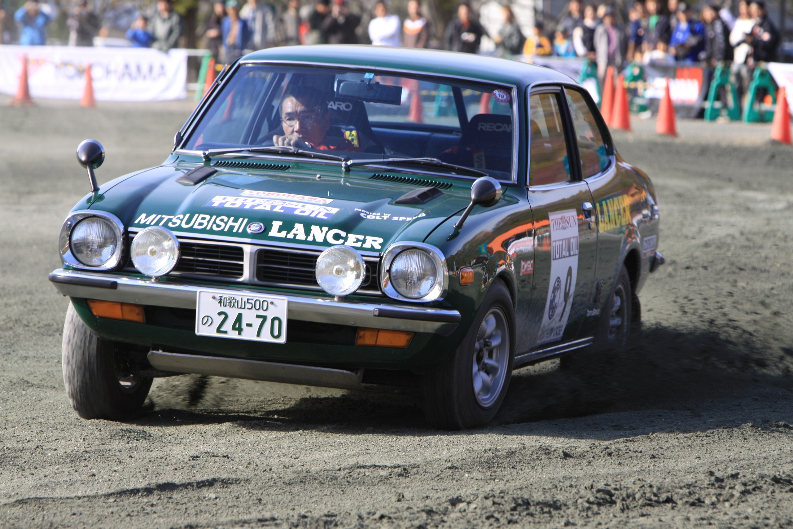 新城ラリー2008 篠塚建次郎